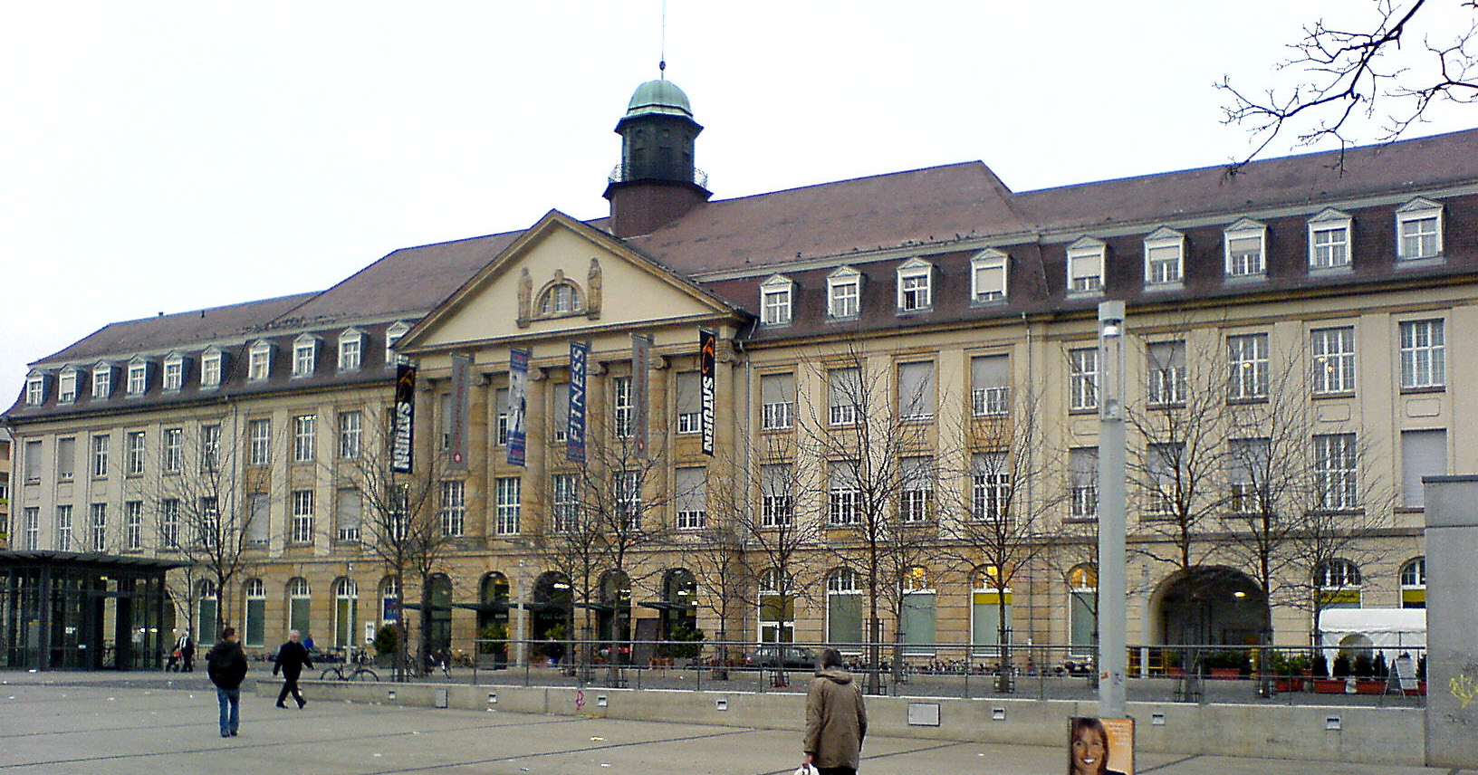 Post Galerie in Karlsruhe, davor der Stephanplatz